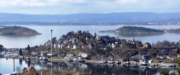 Ormøya ved Oslo, sett fra Bekkelagshøgda.